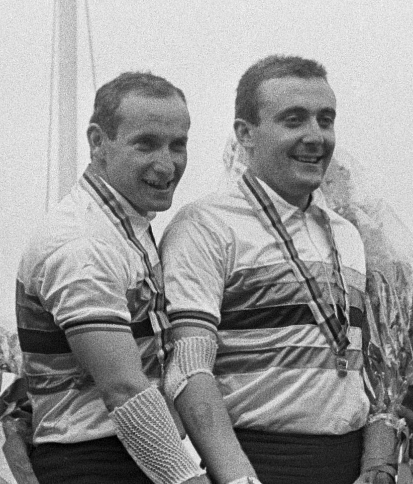 WK Wielrennen op de baan Amsterdam. Ceremonie tandem.